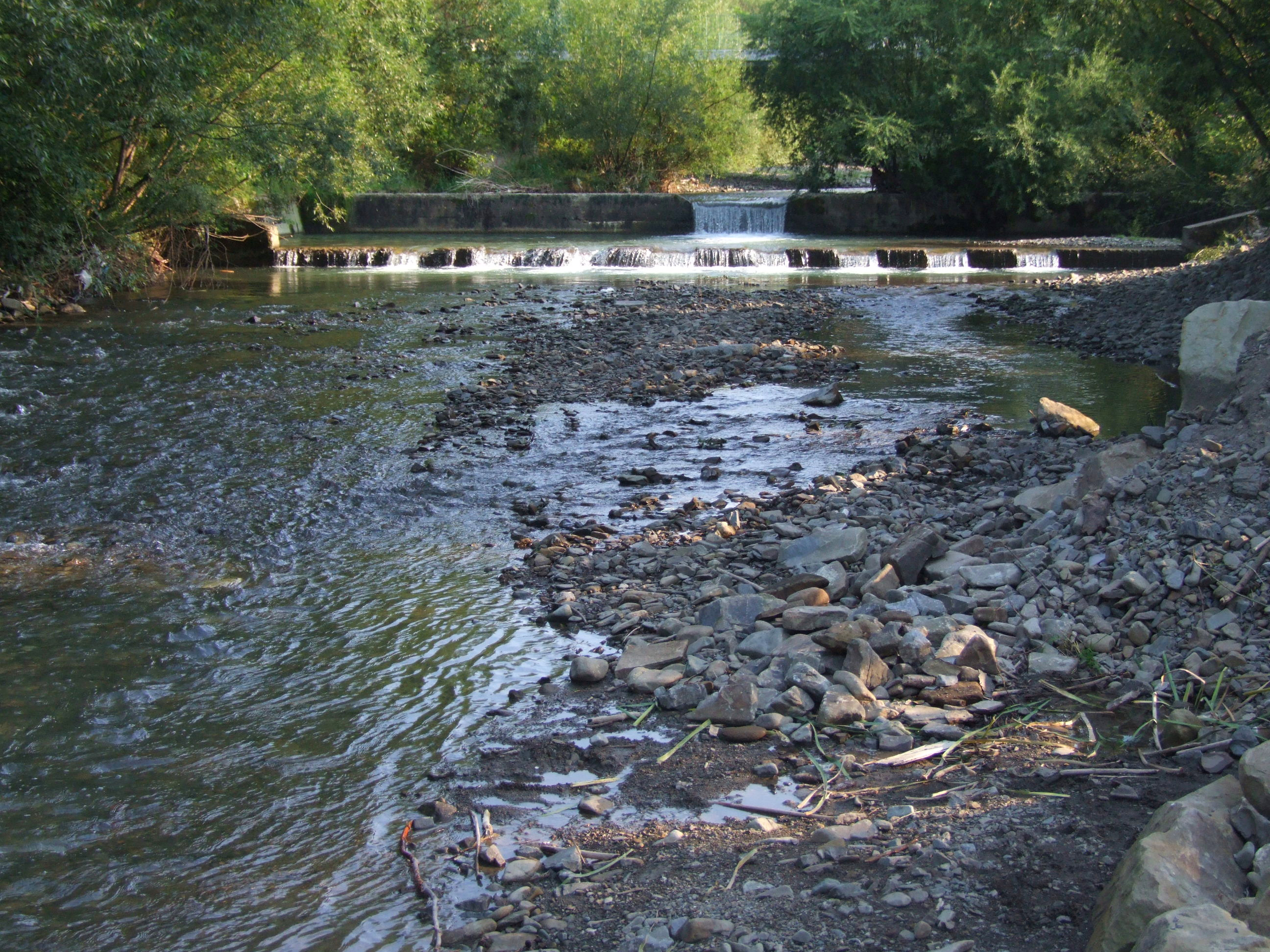 Jurkówka w Jurkowie (obok restauracji "Mogielica", koło mostu na Chyszówki)